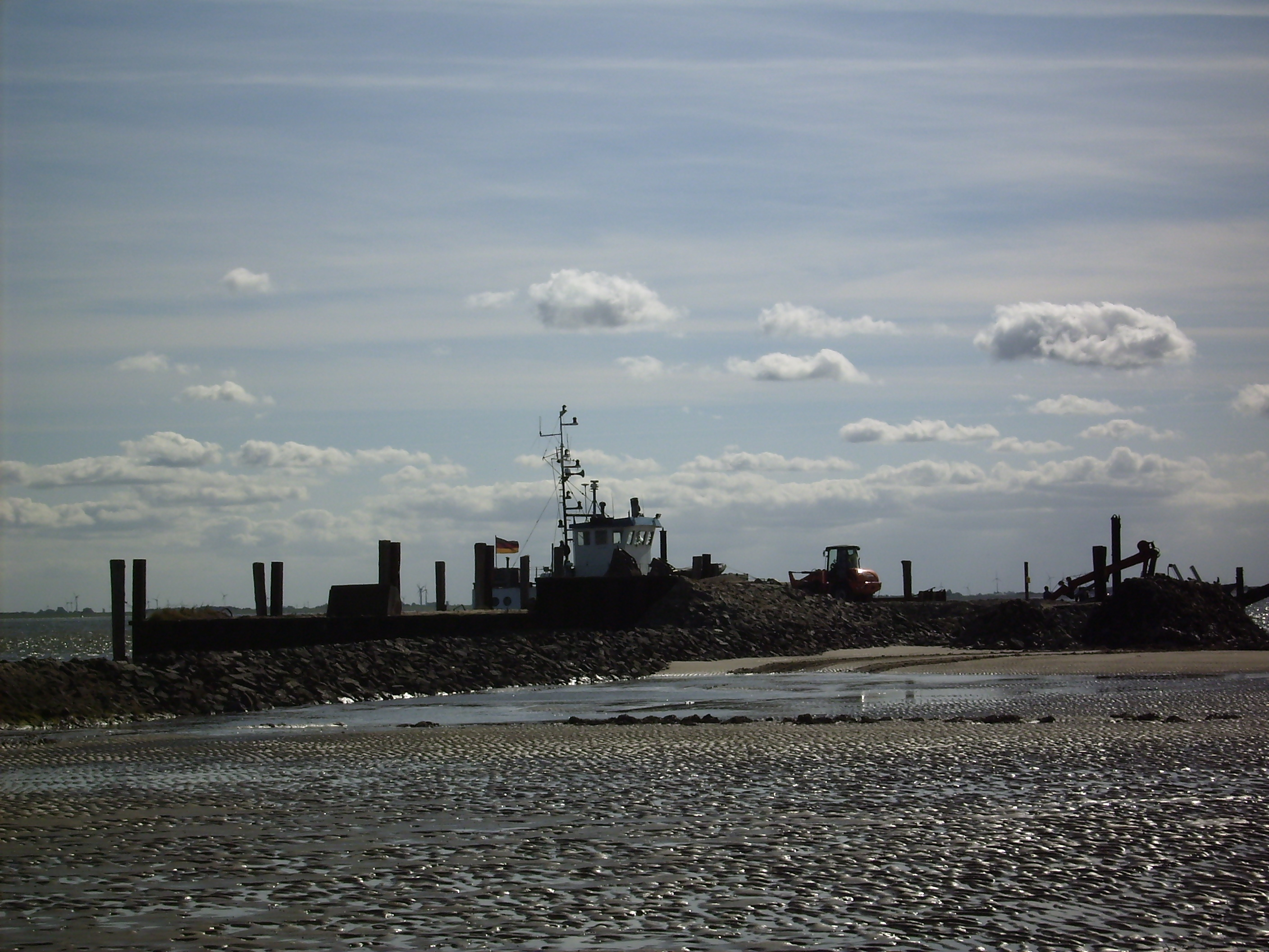 Rückbau des alten Anlegers auf der Insel Spiekeroog im September 2009